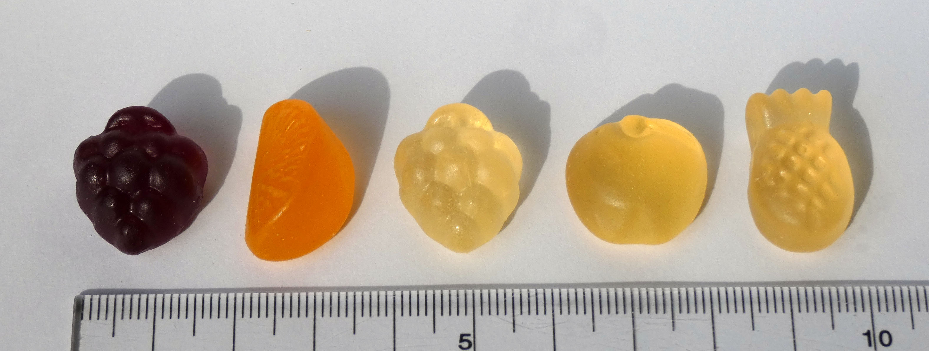 明治 果汁グミ（ぶどう、温州みかん、マスカット、りんご、パイン）